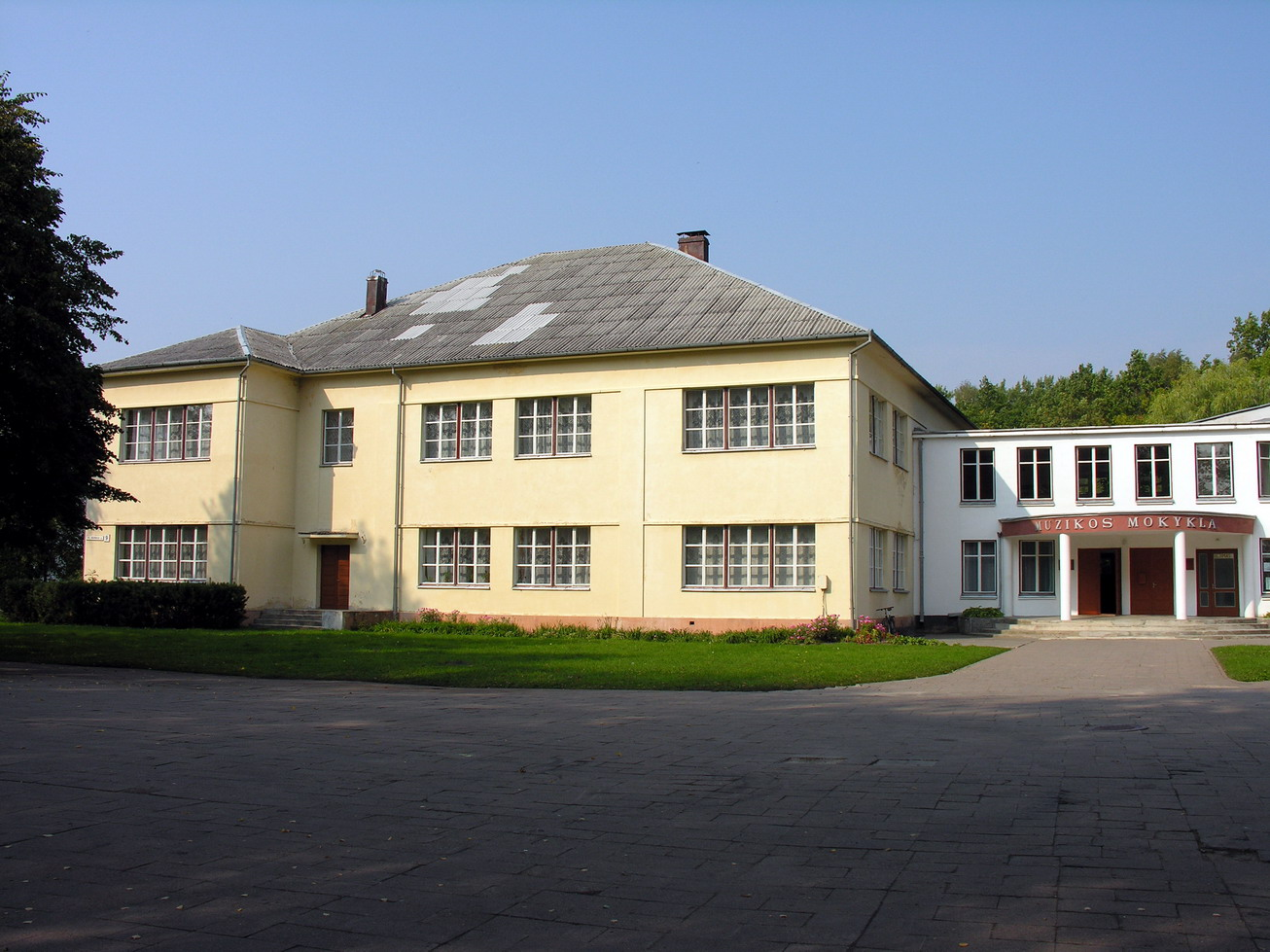 Mažeikių muzikos mokykla